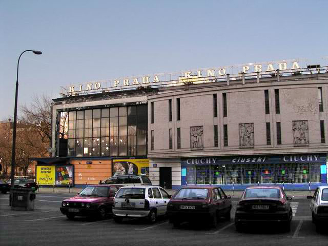 Warszawa - Kino Praha